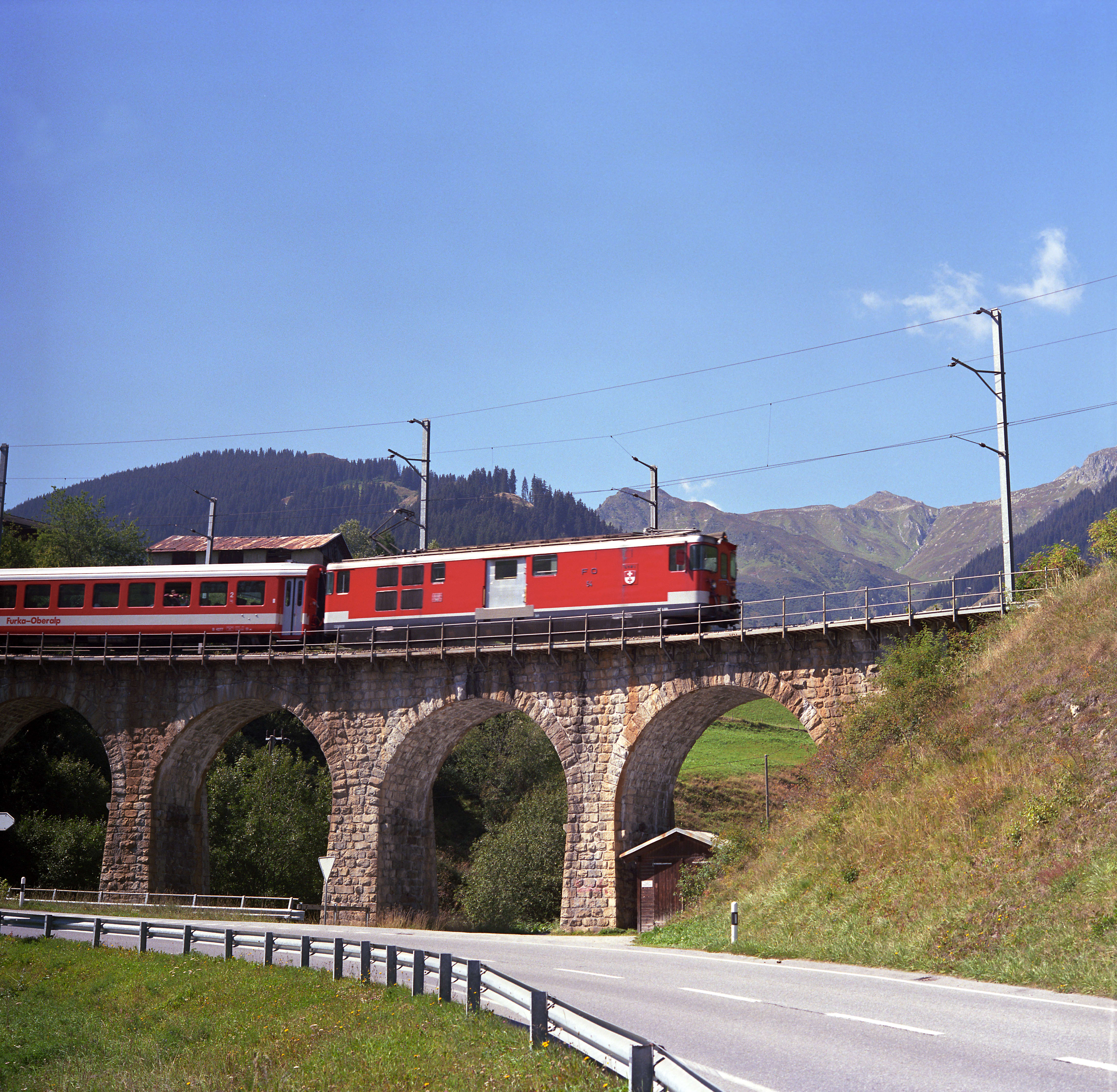 FO-Pendelzug Brig–Disentis zwischen Segnas und Acla de Fontauna